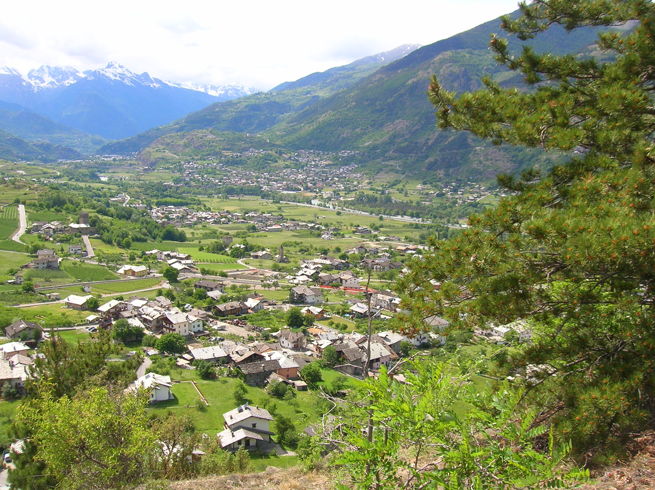 Panorama su Gressan dalla Riserva naturale Côte de Gargantua, Valle d'Aosta, Italia.